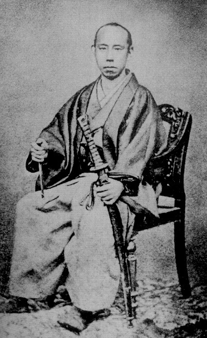 松平春嶽 Matudaira Syungaku.